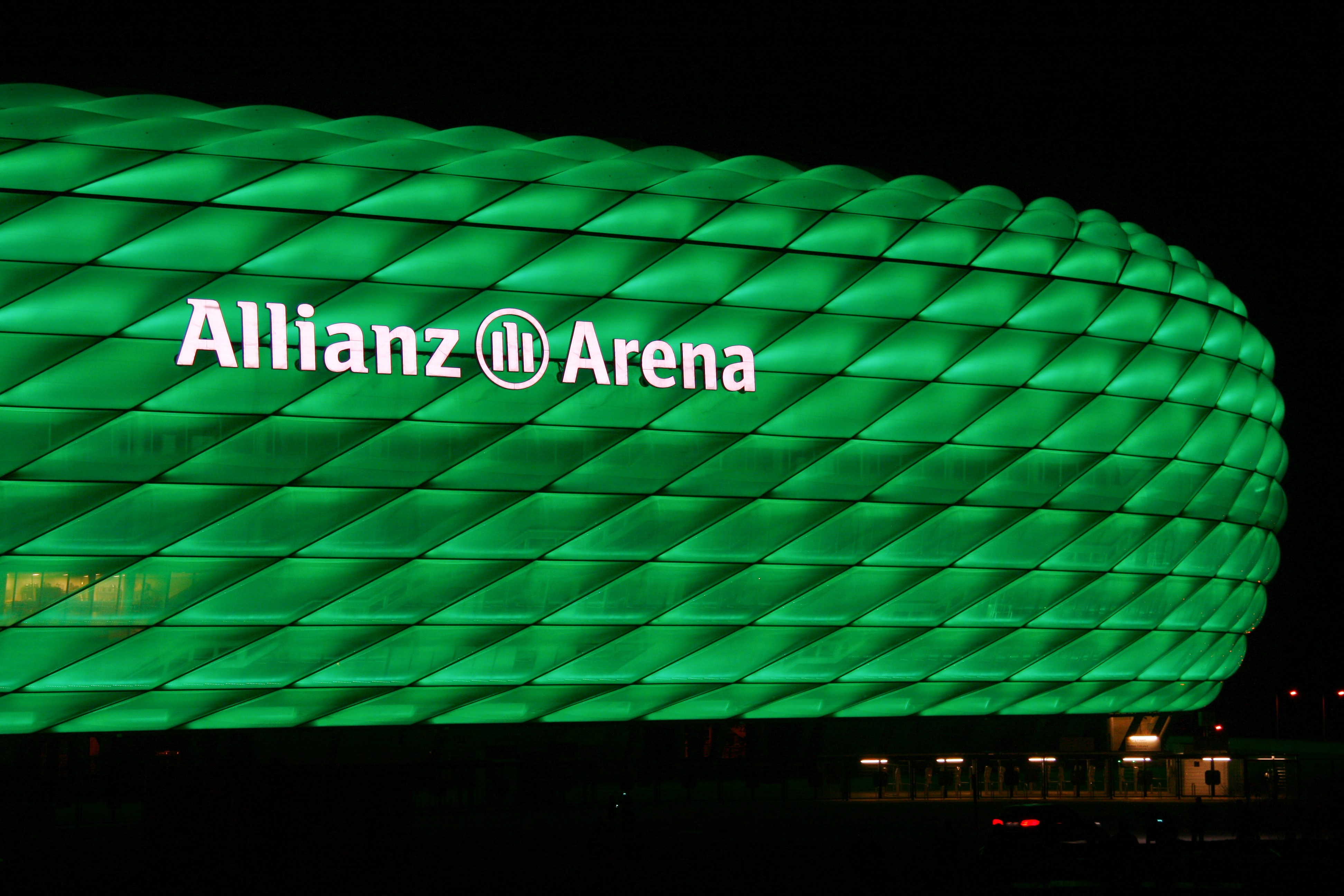 LED Beleuchtung der Allianz Arena München am St. Patrick's Day 2015